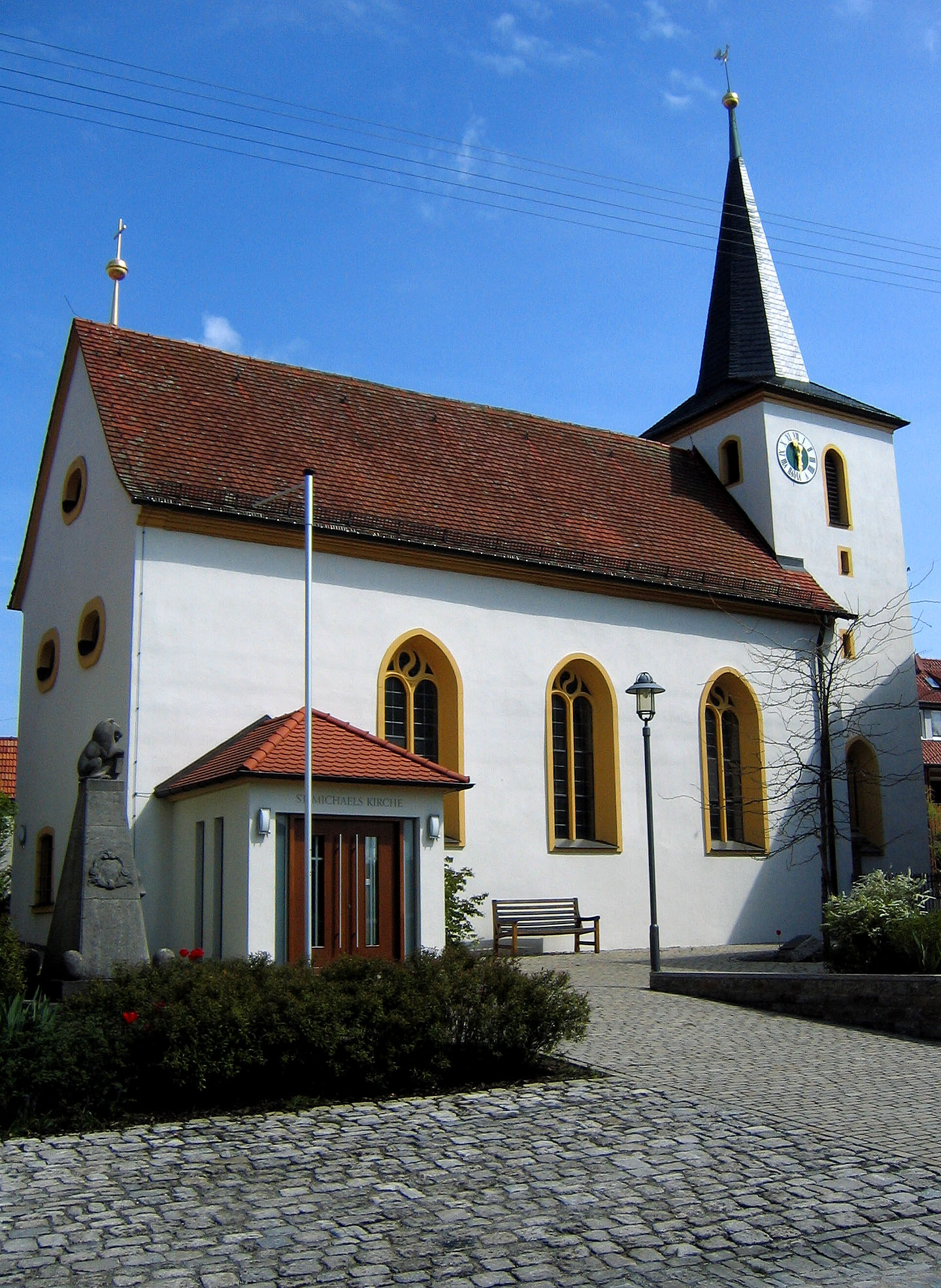 Die evangelische St.Michaelskirche in Michelfeld.